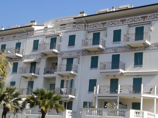 Immagine dell'ex-hotel Britannique, facciata sud